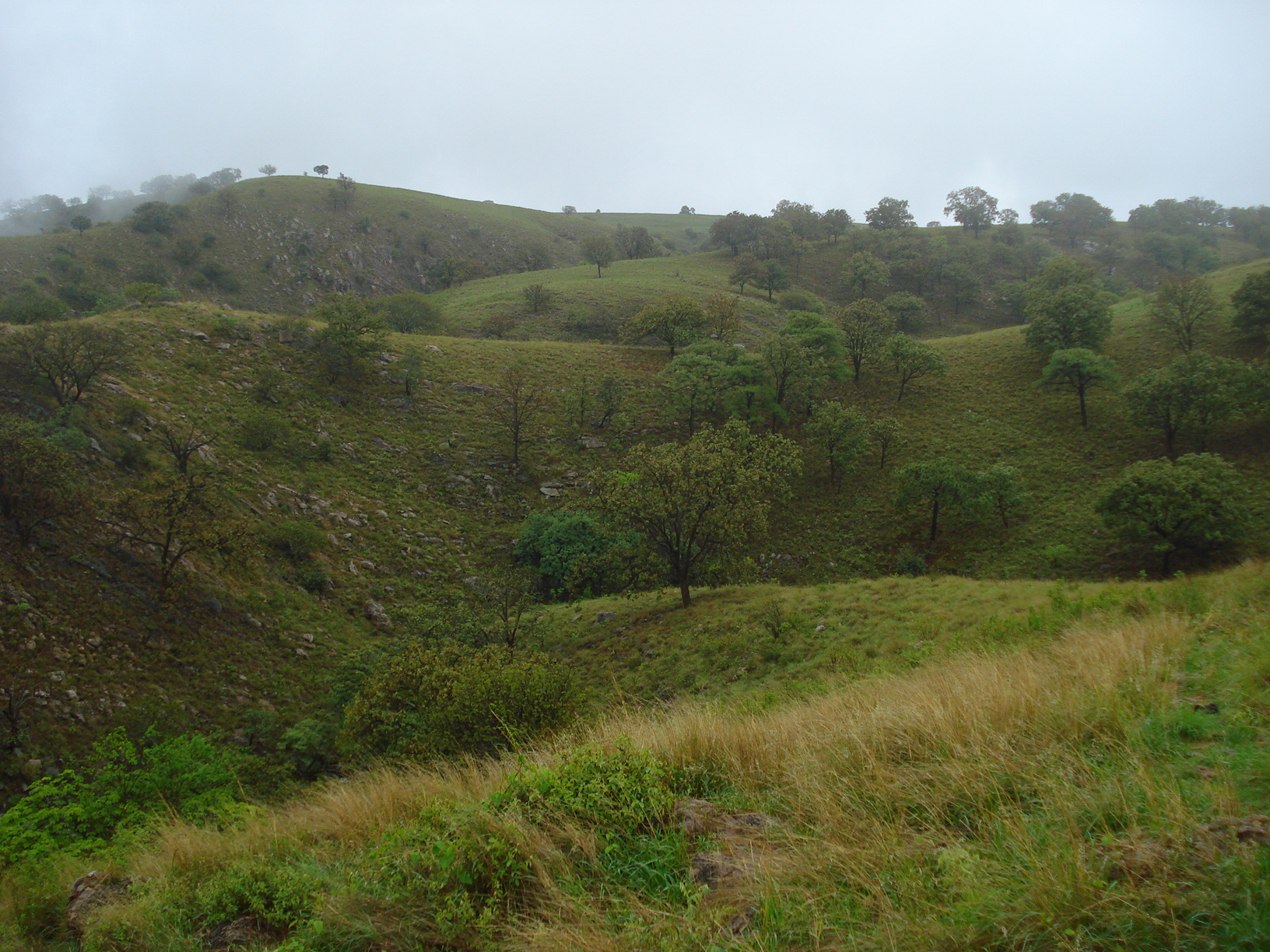 Muy cerca de Guadalajara se pueden apreciar estos hermosos paisajes.